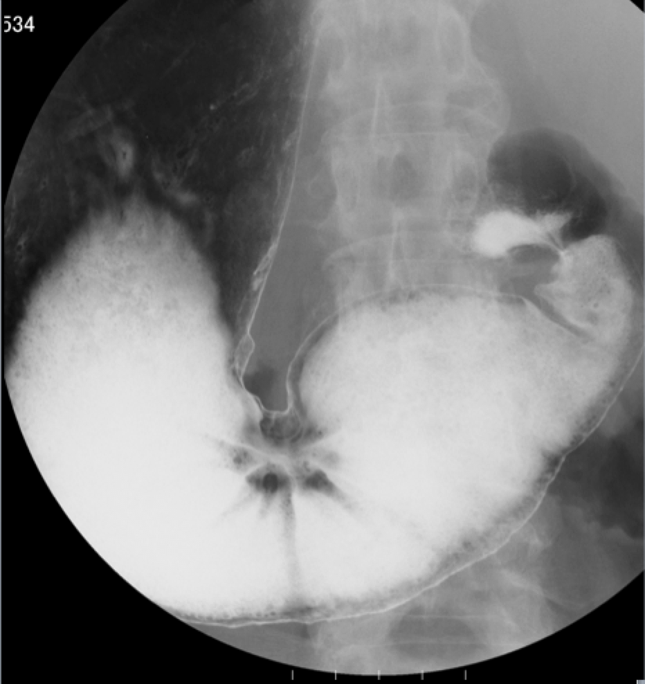 胃体中部前壁に発生した3型胃癌(腹臥位やや頭低位による撮影)